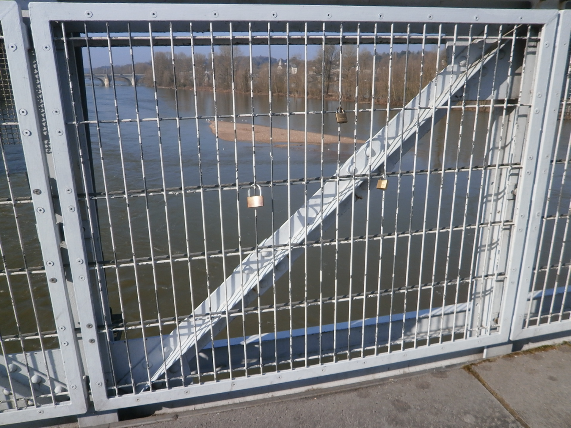 Les "cadenas des amoureux" accrochés au tablier du pont